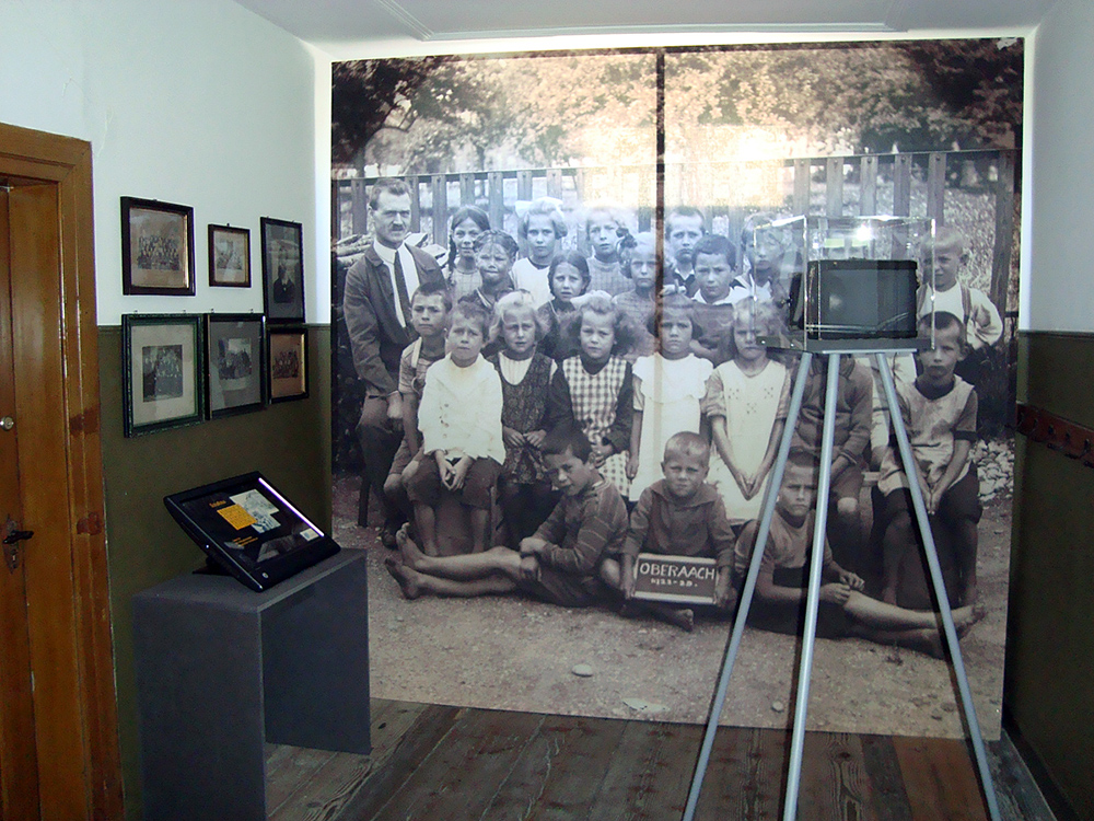 Ausstellungsfoto